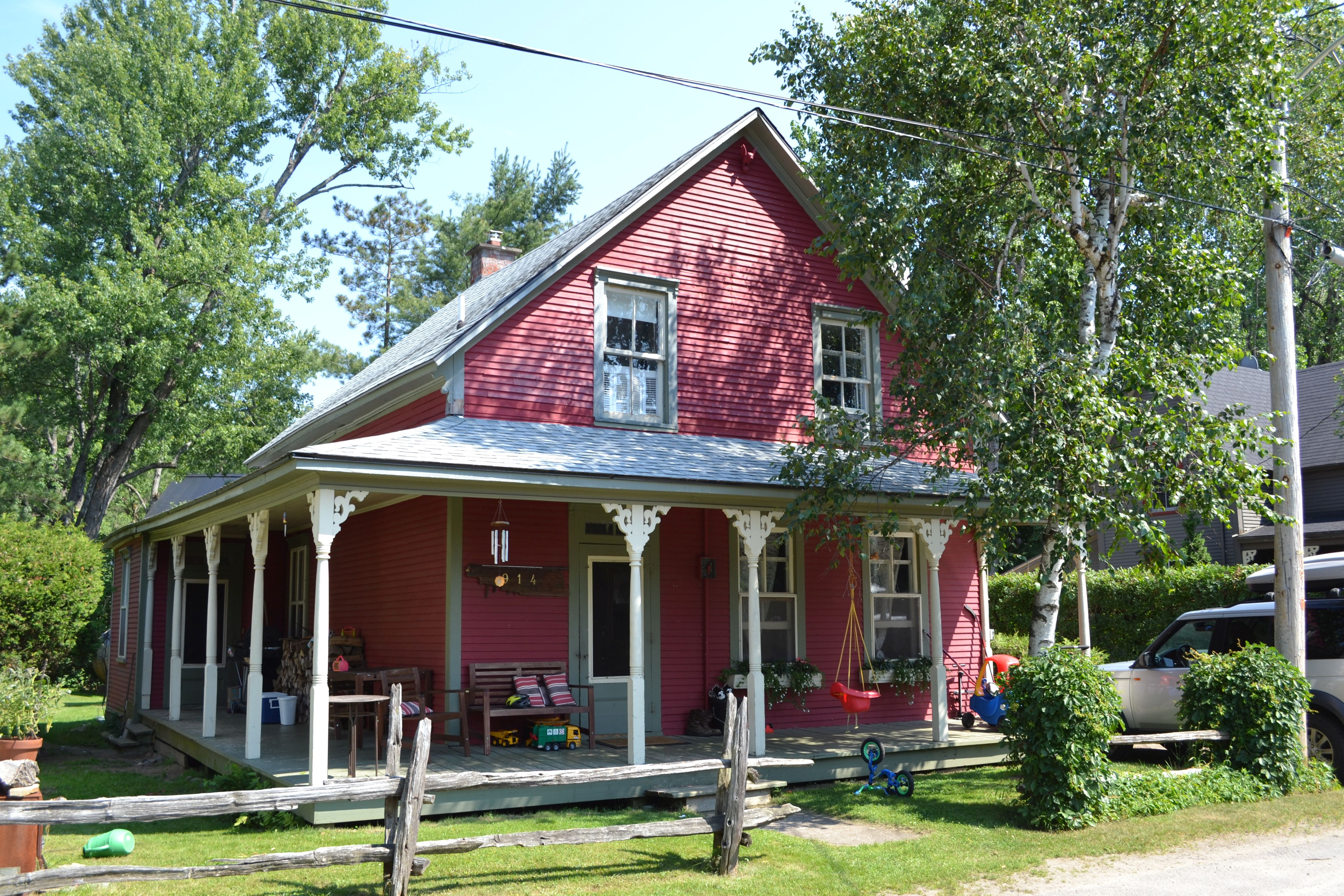 914, rue Beattie (H sur la carte plus bas) à Mont-Tremblant au Québec.